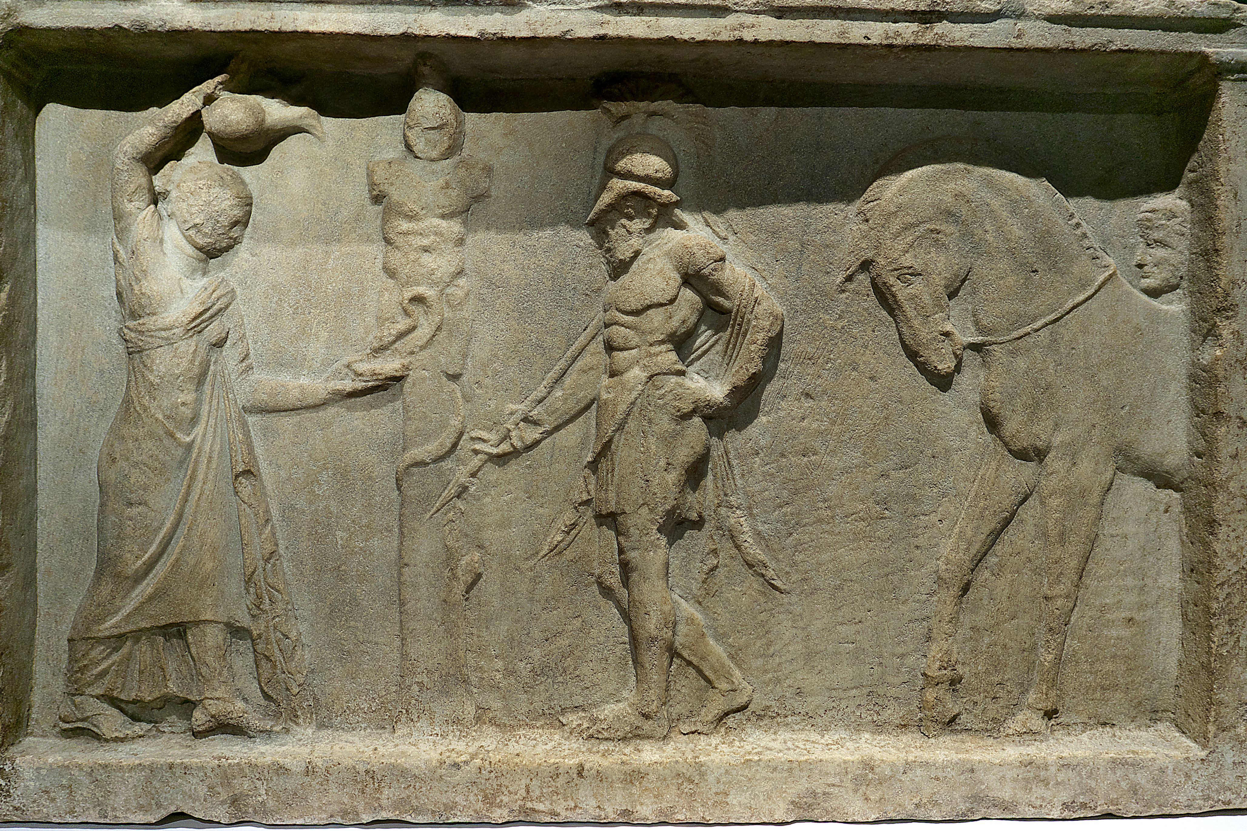 Agón! La competición en la antigua Grecia (Sevilla). Relieve de mármol (100 a.C.) conmemorativo de una batalla. Una serpiente (símbolo del viaje al más allá) bebe en el cuenco de la libación. Posible procedencia de Esmirna.